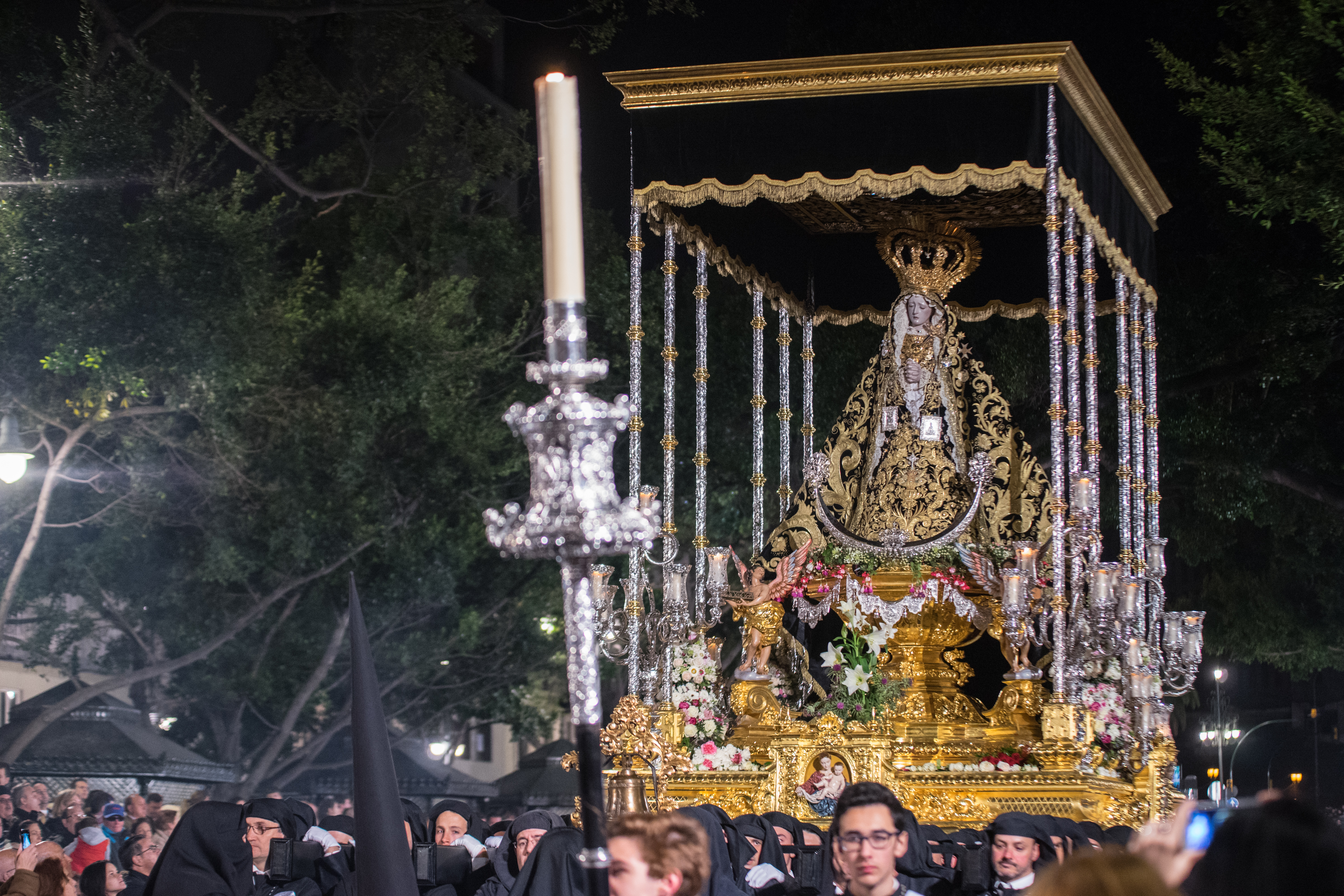 Trono de la Virgen de los Dolores de la Antigua Cofradía del Stmo. Cristo del Perdón y Ntra. Sra. de los Dolores This is a photography of a Folklore festival in Spain (Wikidata id Q9075883).